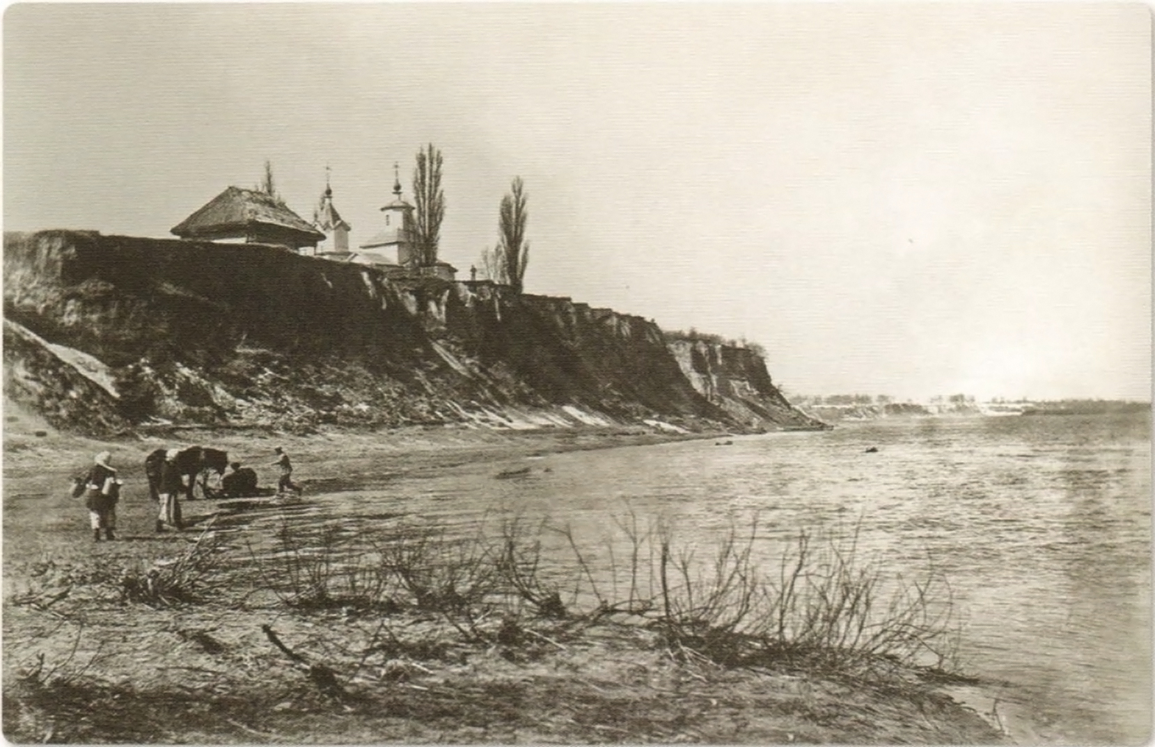 Беларуская (тарашкевіца): Горваль (Horval)